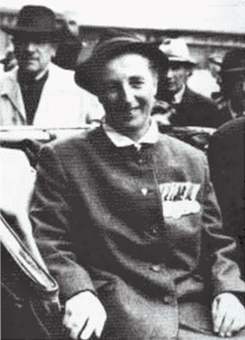 Viktoria Savs negli anni dopo la guerra